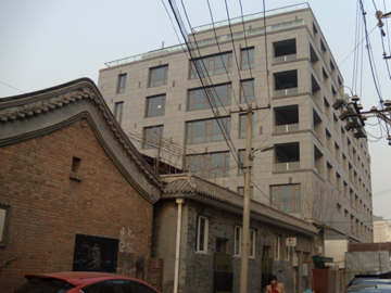 嵩祝寺山门等建筑原址处的大楼